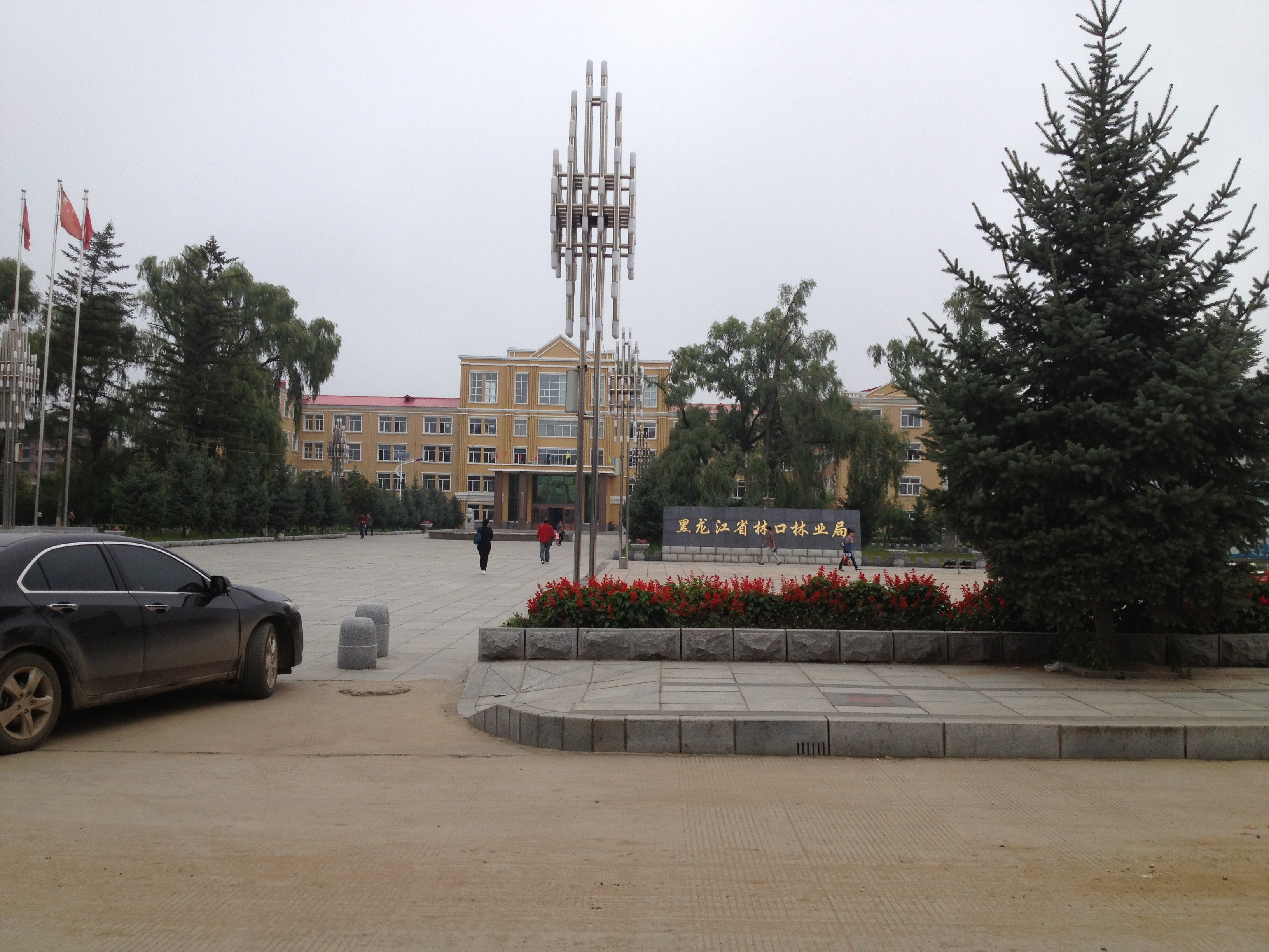 古城林口林业局